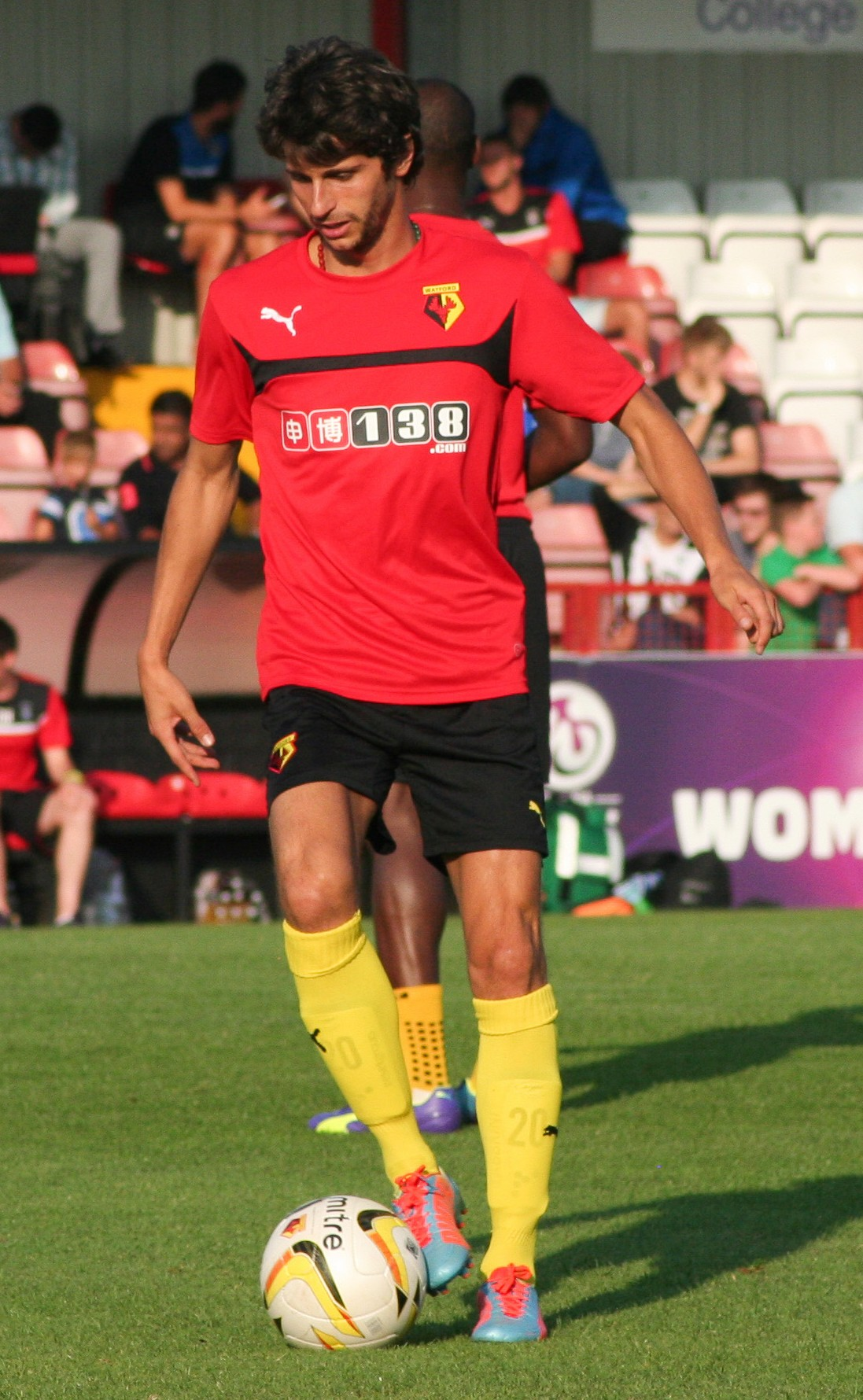 Diego Fabbrini during 2014/15 pre-season.